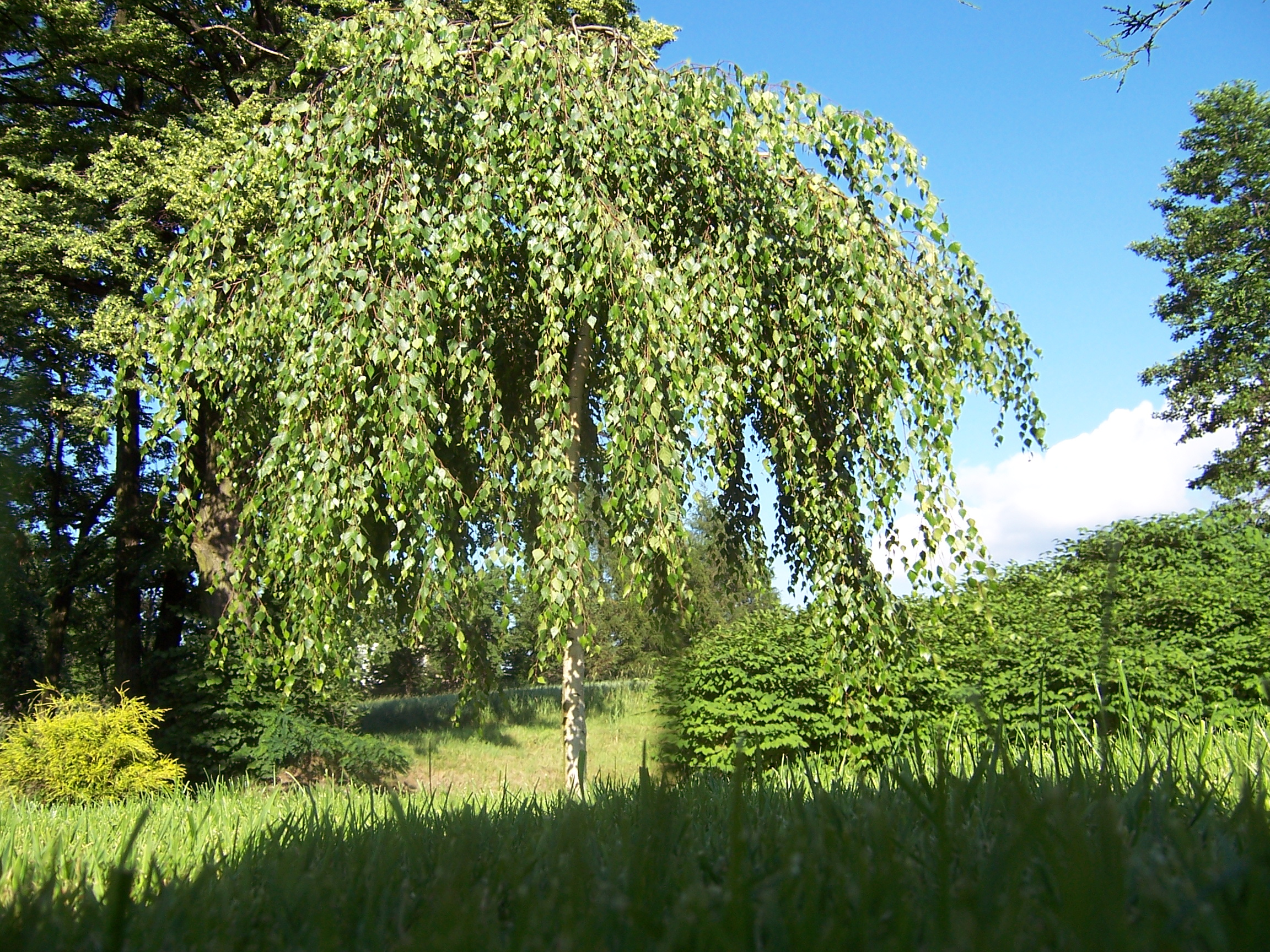 Brzoza zwisla Betula pendula 'Youngii'